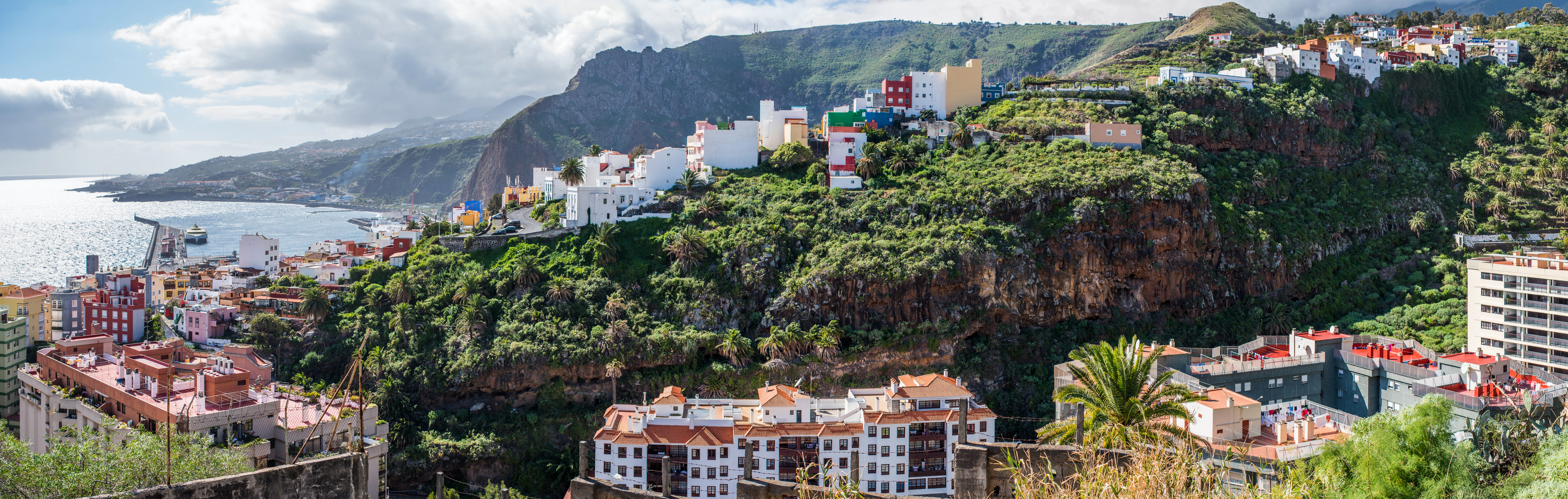 Santa Cruz, La Palma